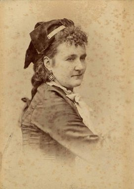 Bulyovszky Lilla magyar színésznő (1834-1909) kb. 40 éves korában